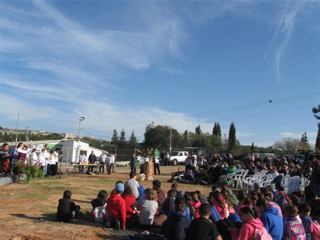 נטיעות בכישורית, ט"ו בשבט תשע"א 2011 צילום: אסתי סלע